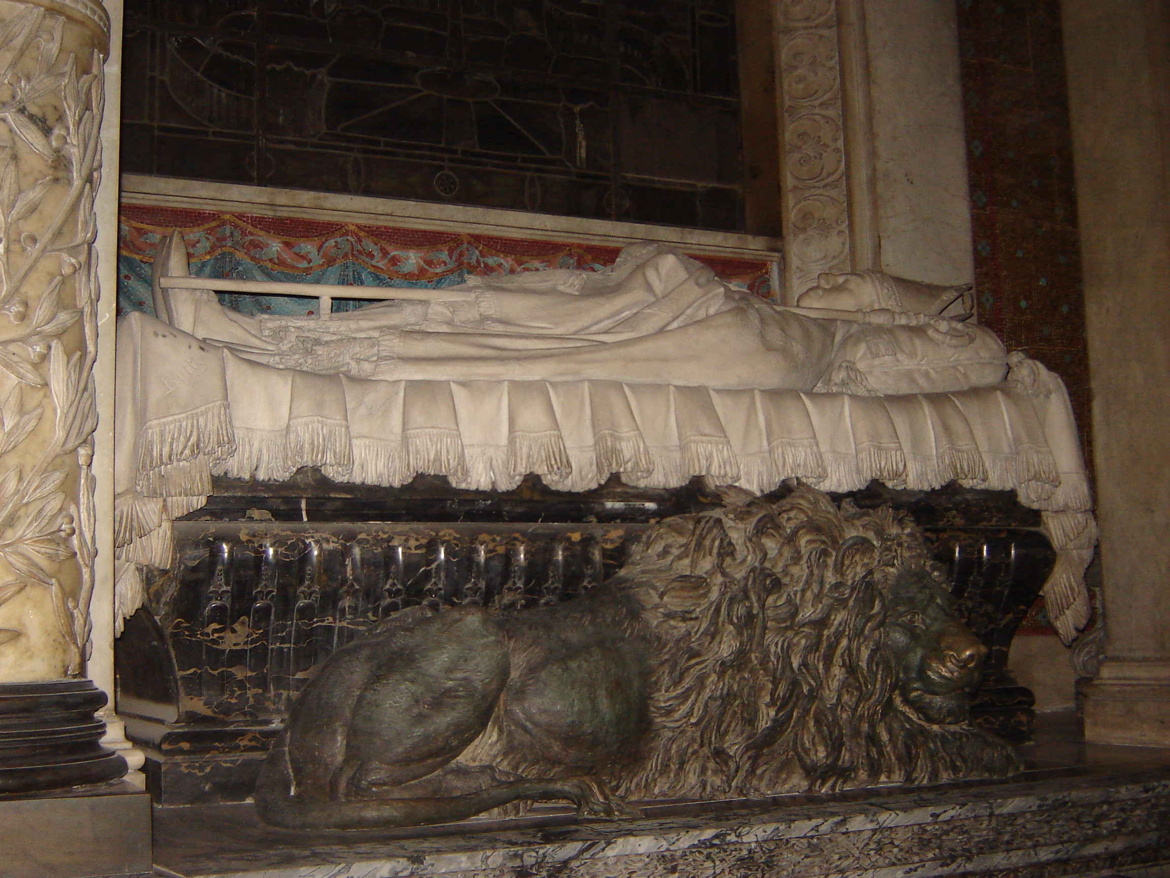 La fotografia es trabajo propio del autor del articulo